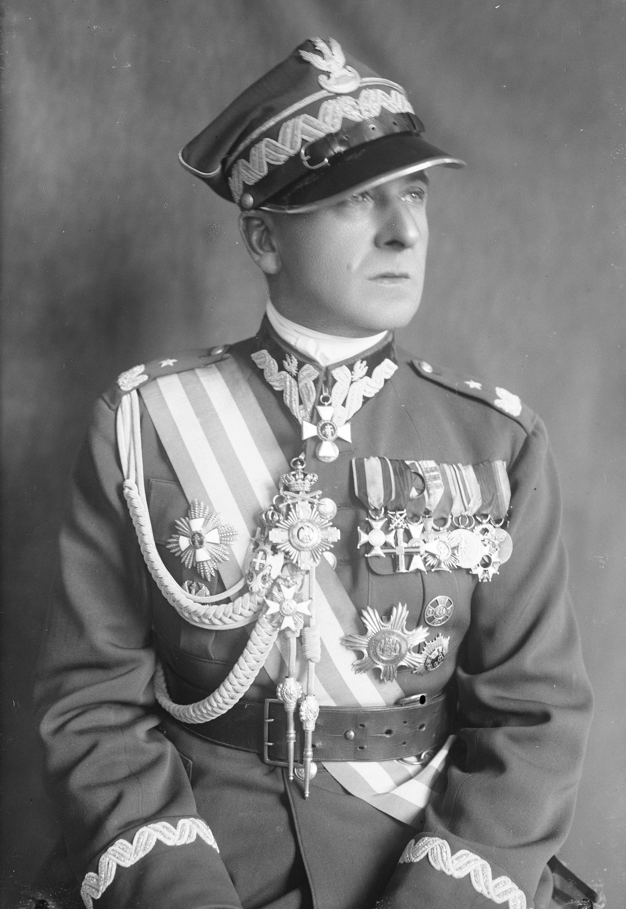 Portret siedzący (półpostać) w czapce - w ujęciu 3/4.